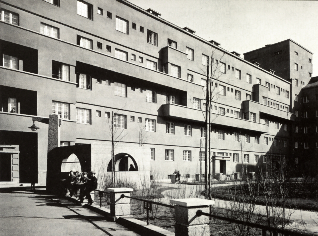 Wohnhausanlage Bebelhof in Wien-Meidling, Innenhof, 1930